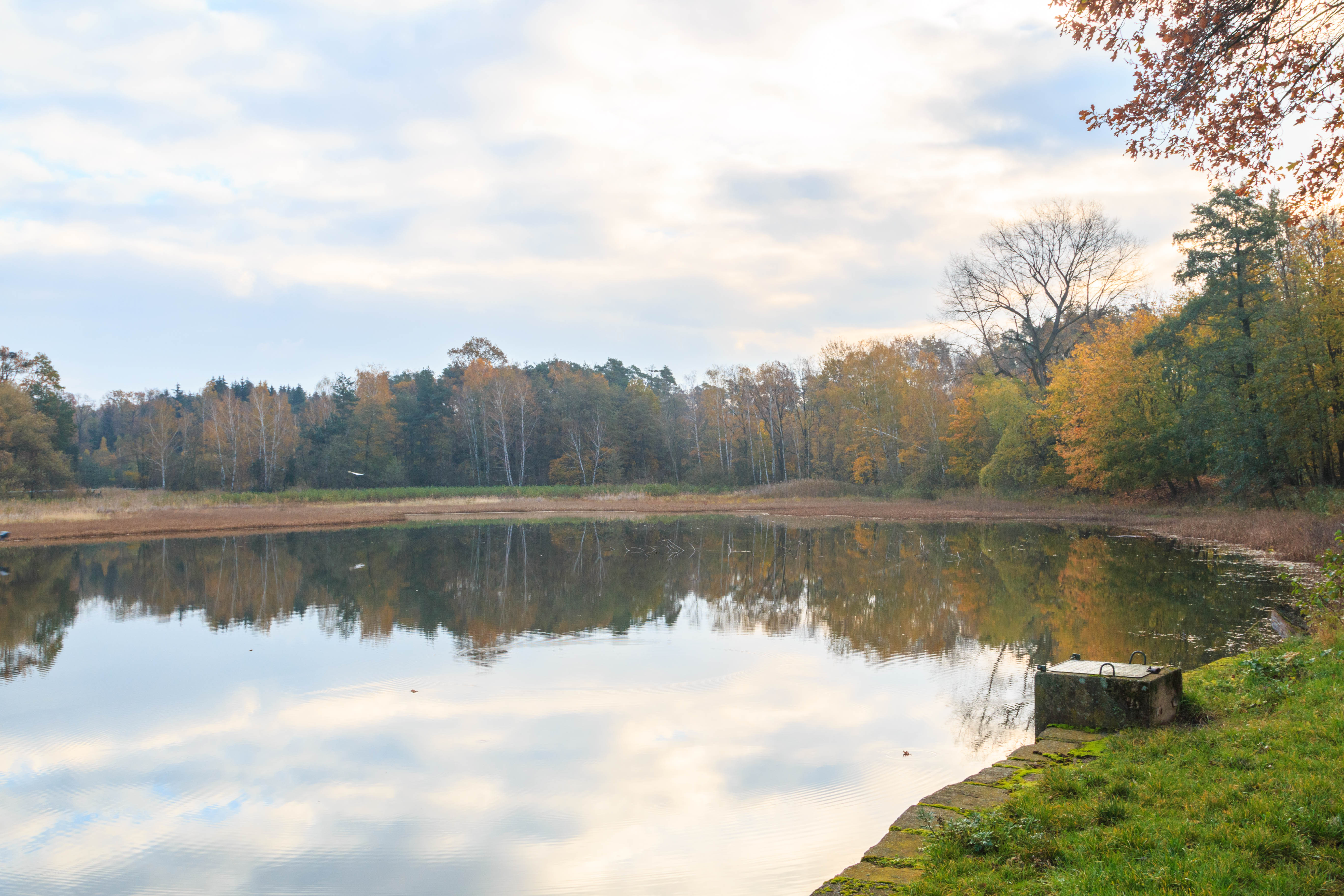 Rybník Dolní Jílovka Project: Vodstvo.